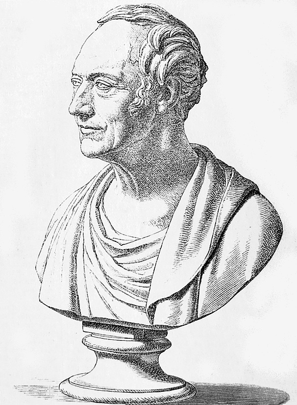 Buste af Johan Ludvig Heiberg 14. december 1791 – 25. august 1860, der var en dansk dramatiker og indflydelsesrig kritiker.